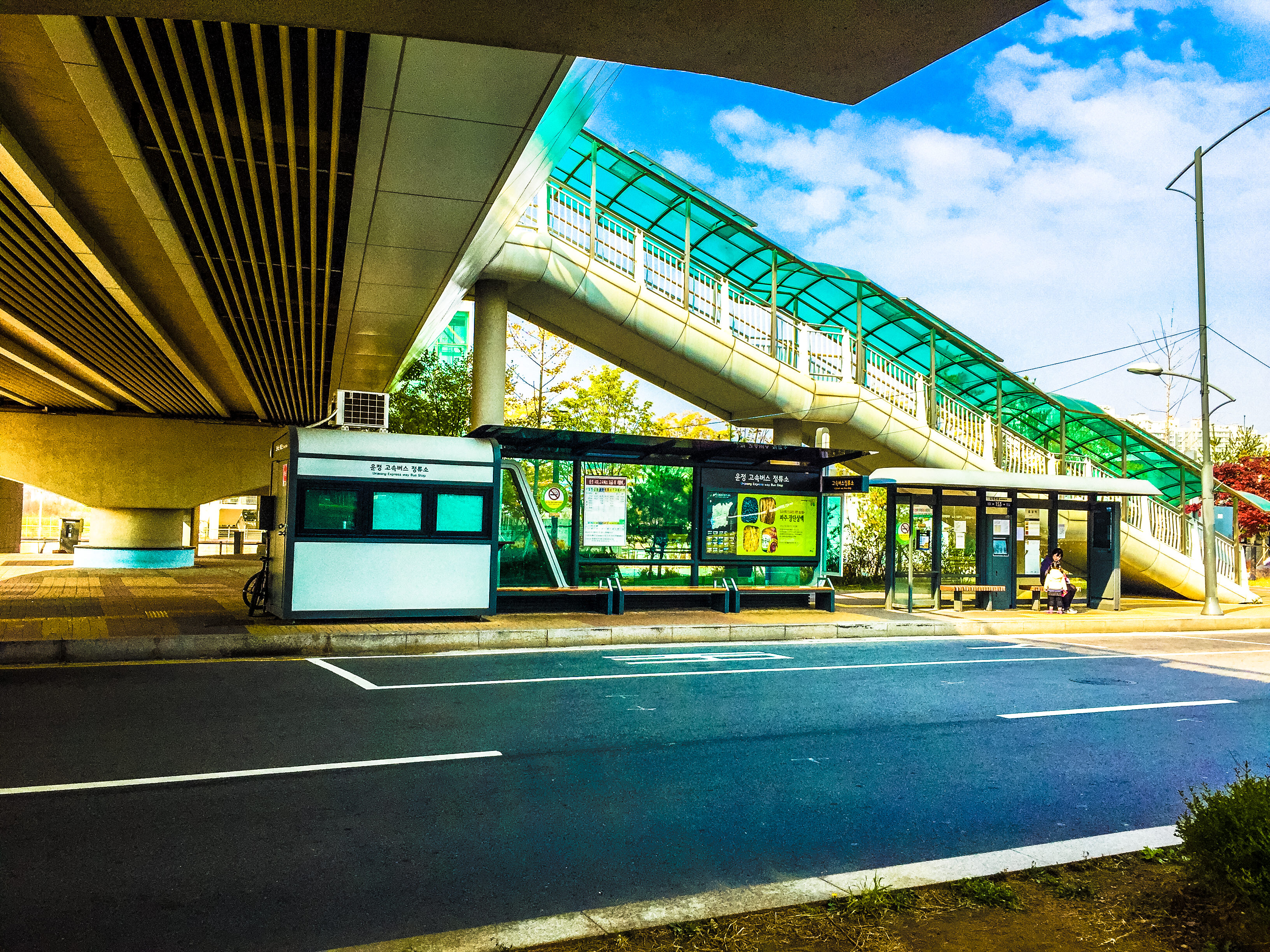 운정역고속버스정류장